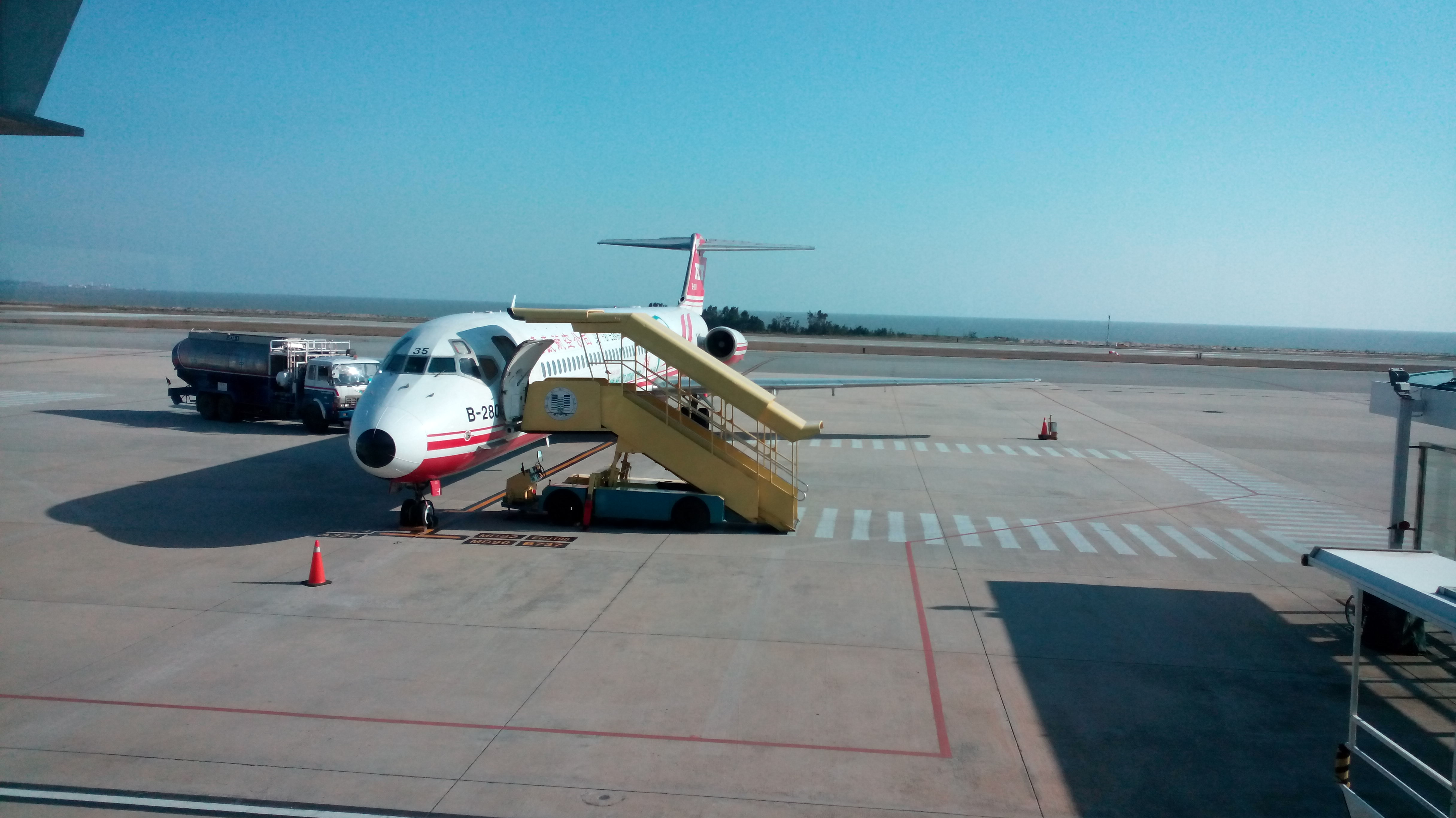 金門機場登機口及部分跑道